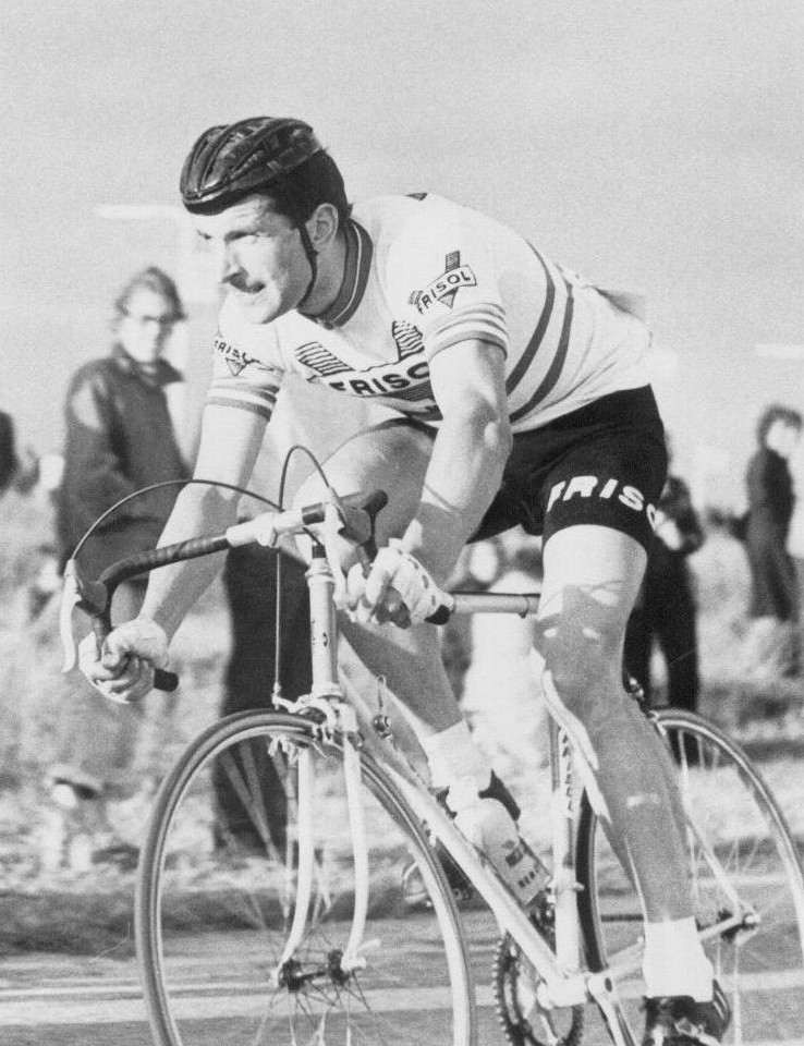 Fedor tijdens Ronde van Steenwijk 1976. Hij reed daar op achterstand, maar gaf niet op. Bleef doorrijden als training. Won korte tijd later een etappe in de Ronde van Nederland, zijn eerste overwinning als beroepsrenner.